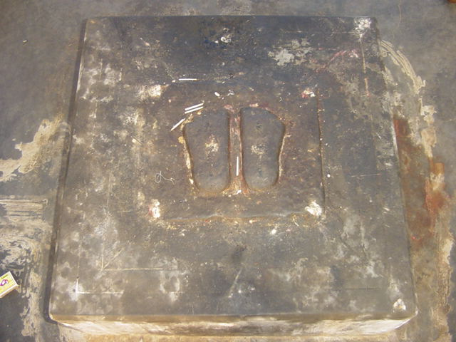 கோடியக்கரையில் காணப்படும் ராமர் பாதம்.